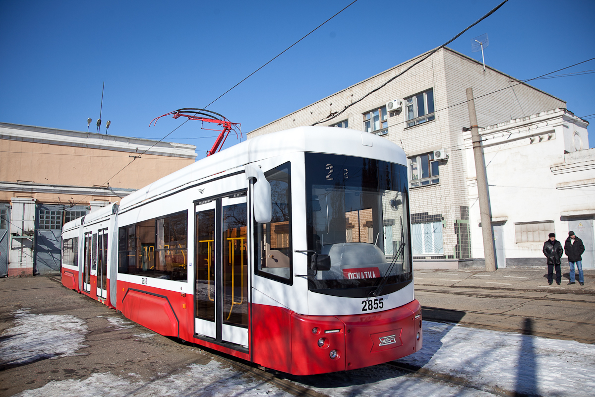 Трамвайный вагон 71-409-01 в Волгограде